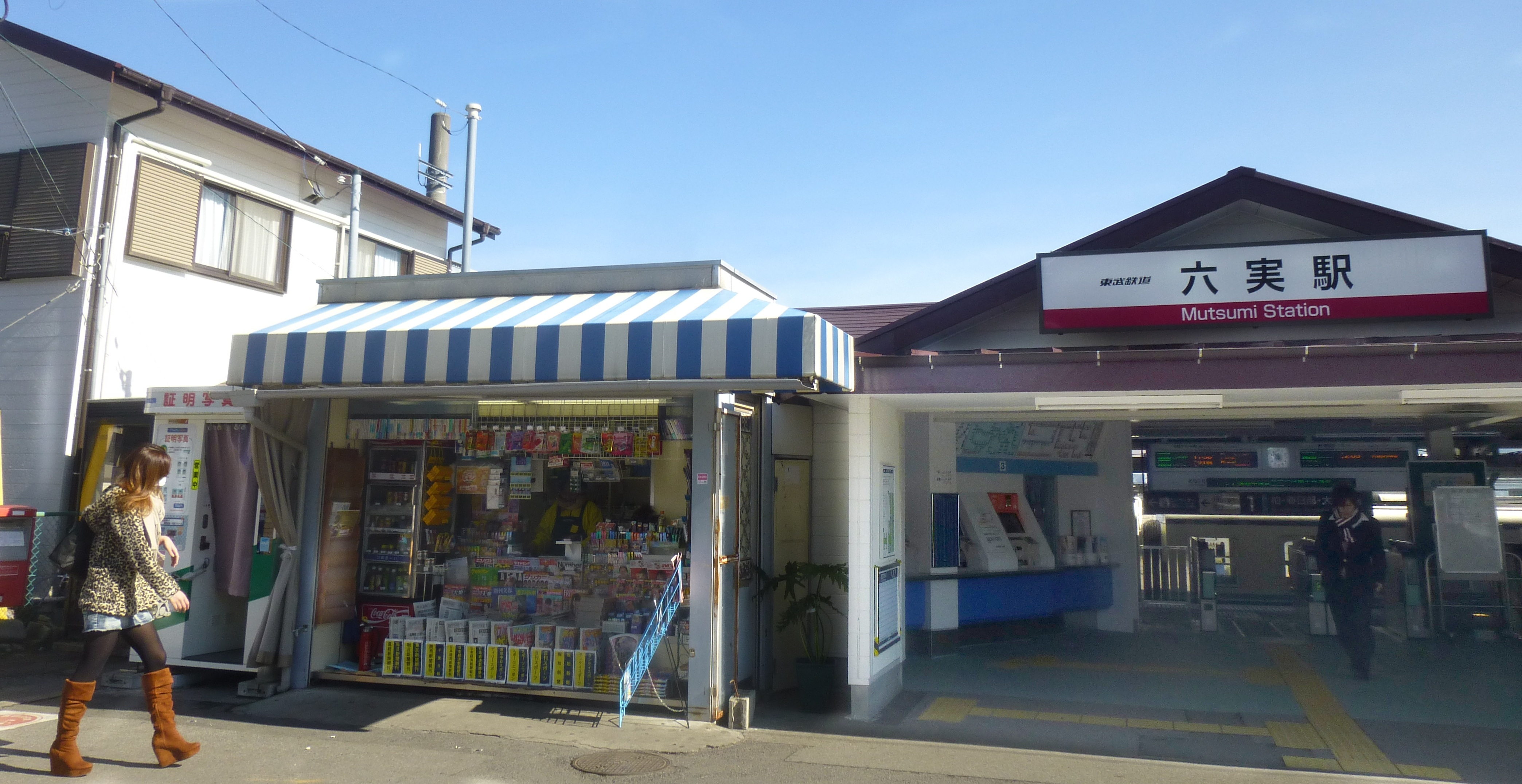 Mutsumi Station (六実駅)